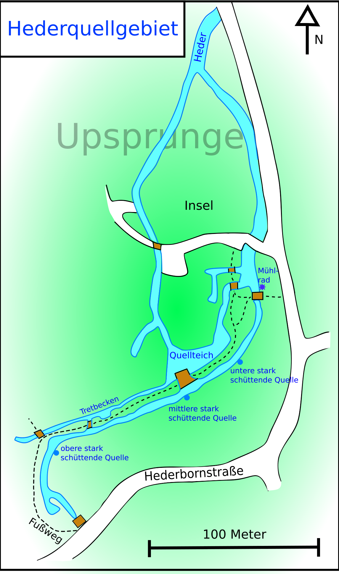 Übersichtskarte des Hederquellgebiets in Upsprunge. (Zur Vereinfachung der Karte wurde die Bebauung im Quellgebiet vernachlässigt)